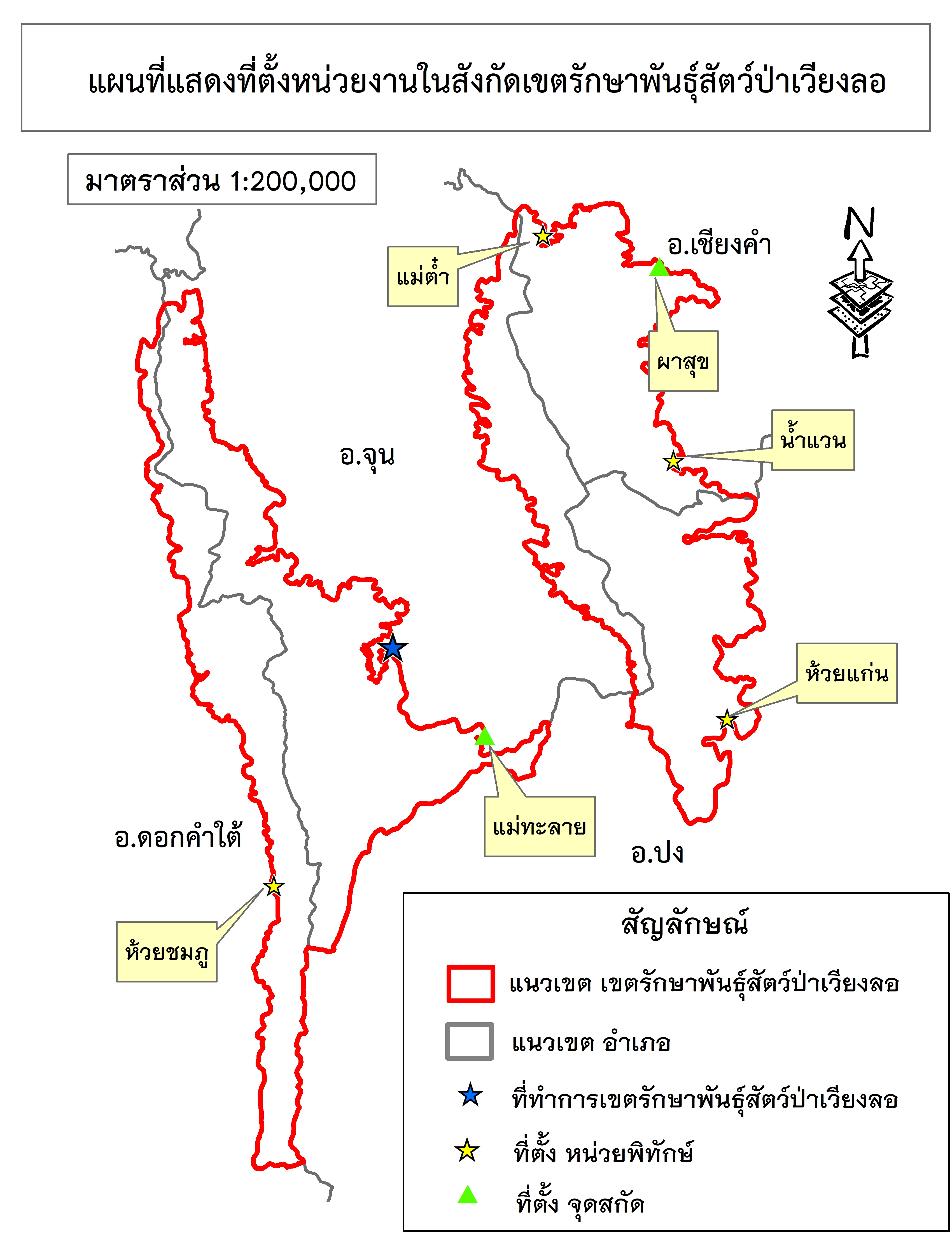 แผนที่แสดงที่ตั้งหน่วยงานในเขตรักษาพันธุ์สัตว์ป่าเวียงลอ